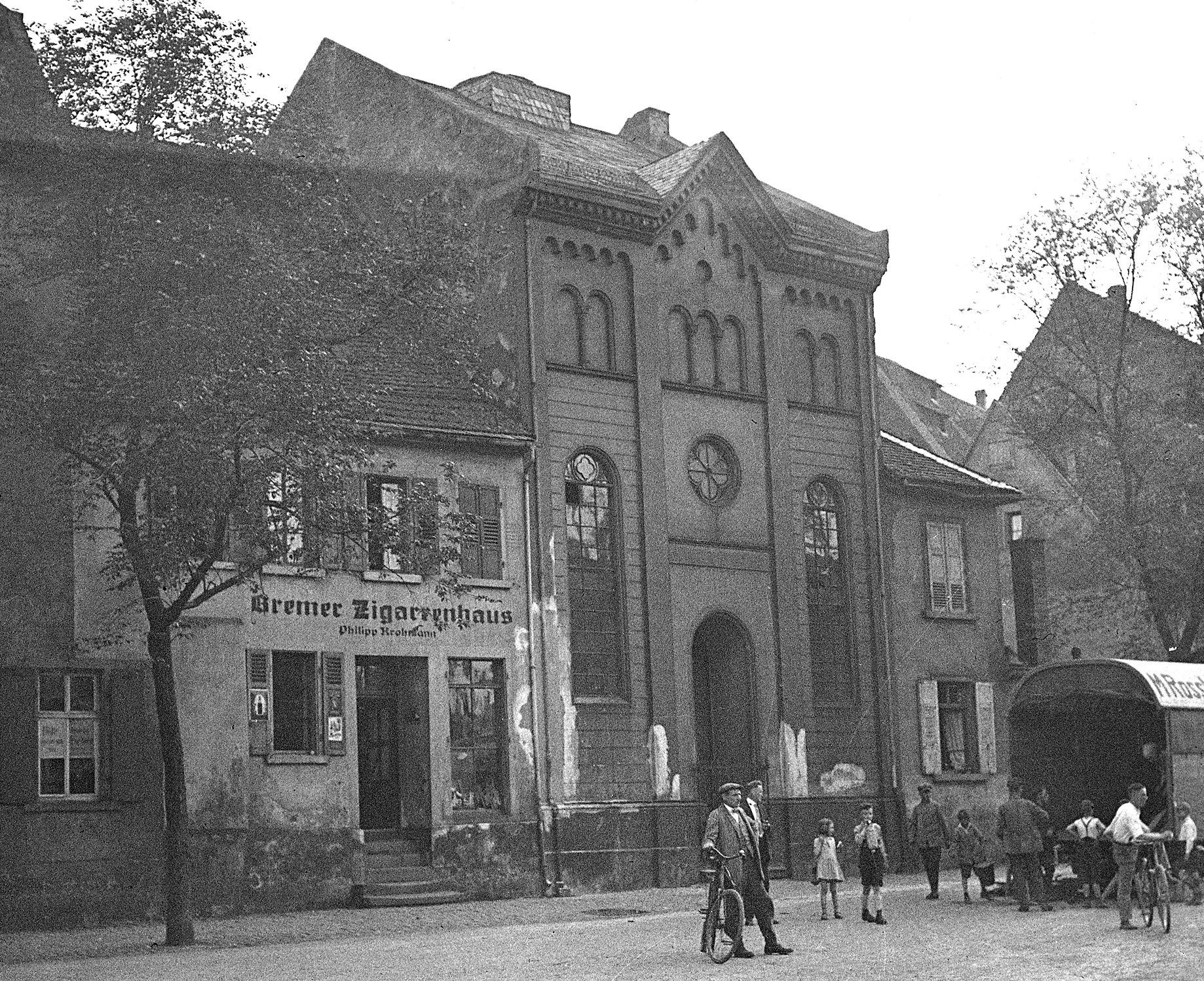 Die Levy’schen Synagoge von hinten.